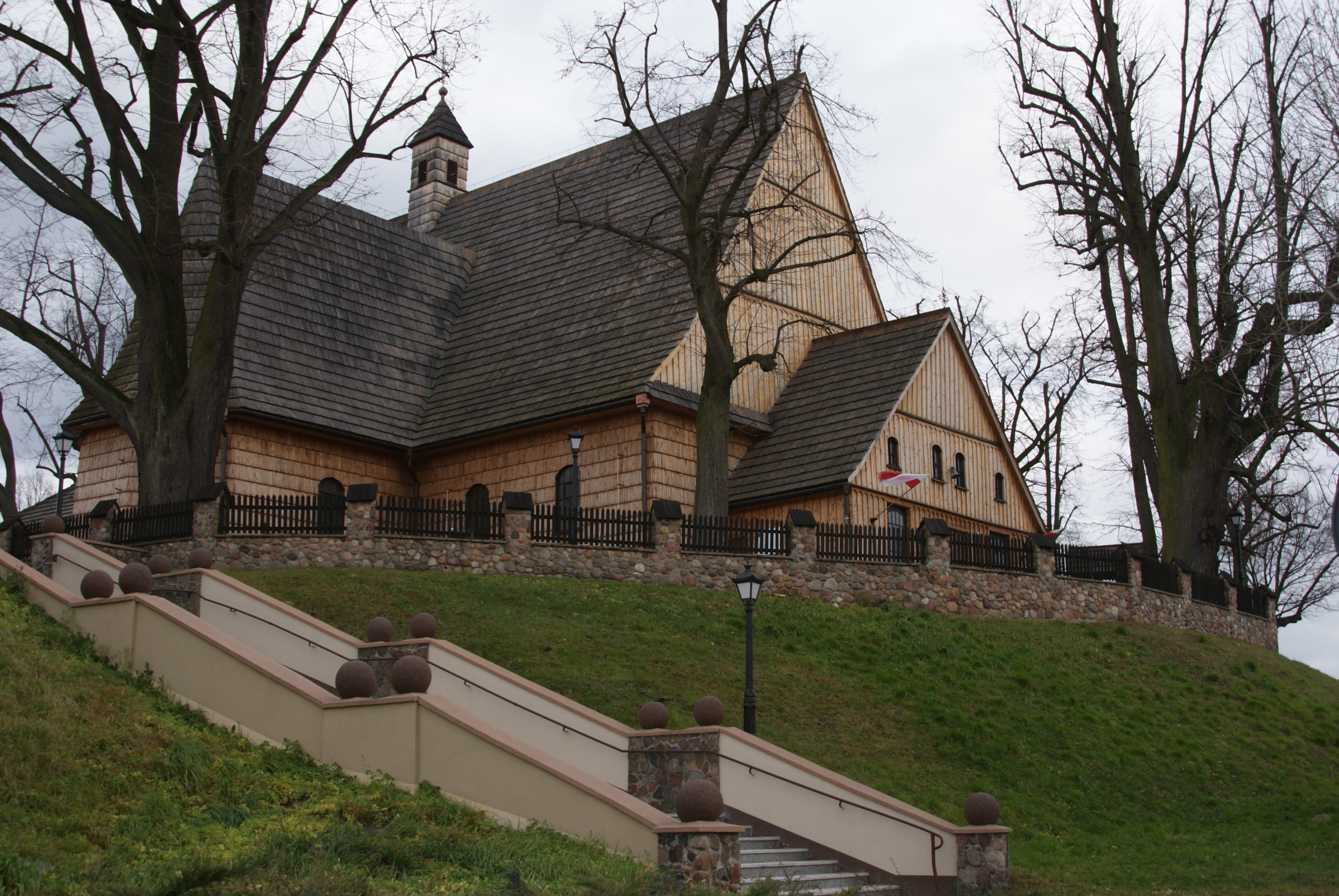 Truskolasy - kościół parafialny p.w. św. Mikołaja